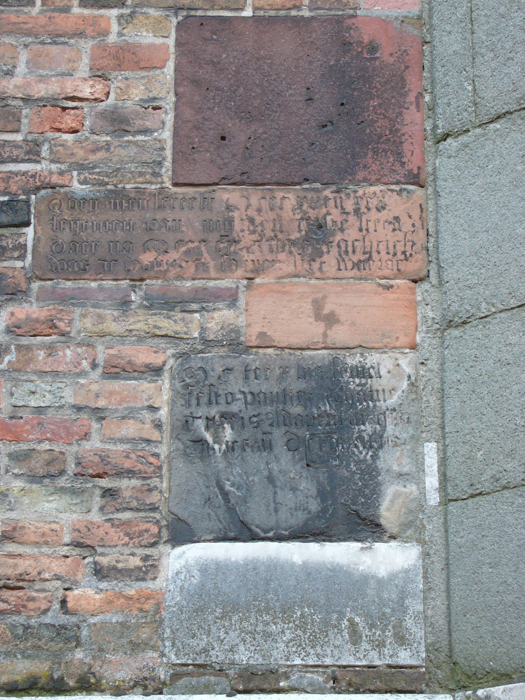 Inscripties op de Domtoren Utrecht